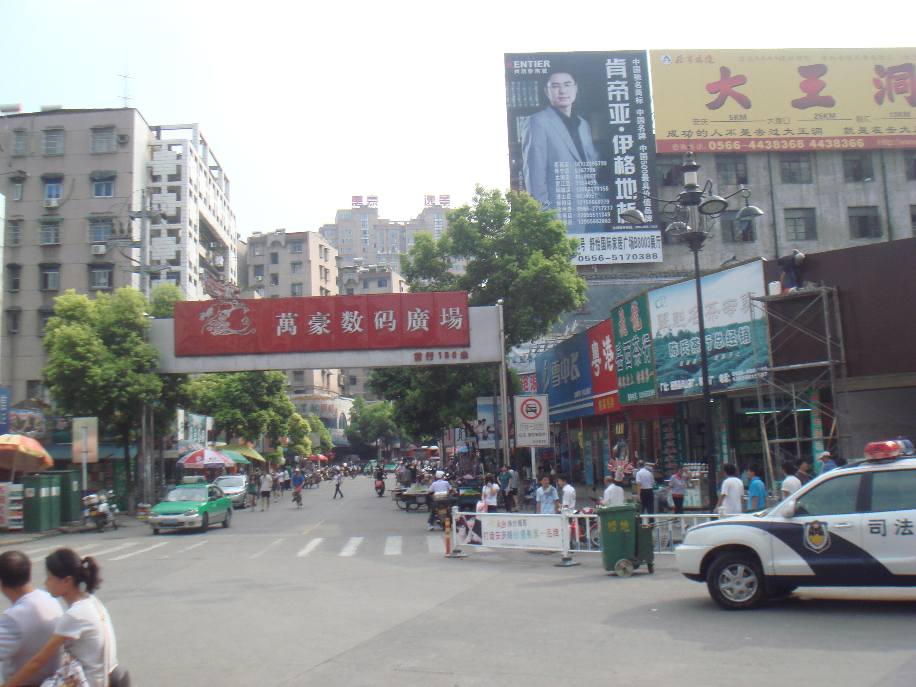 高井头路口（建设路）